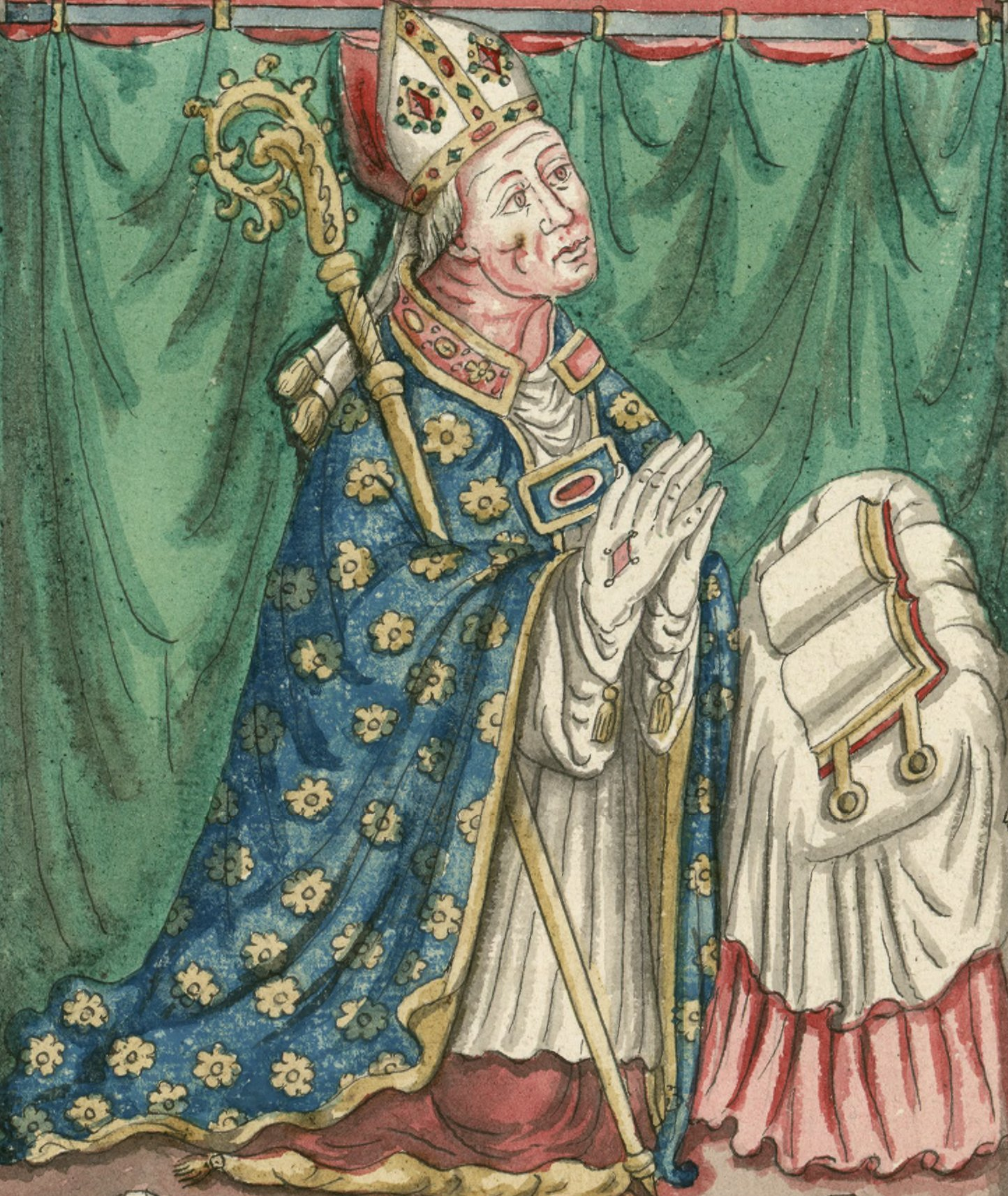 Aquarelle d'un vitrail de l'église du monastère des Célestins de Marcoussis représentant Gérard de Montaigu